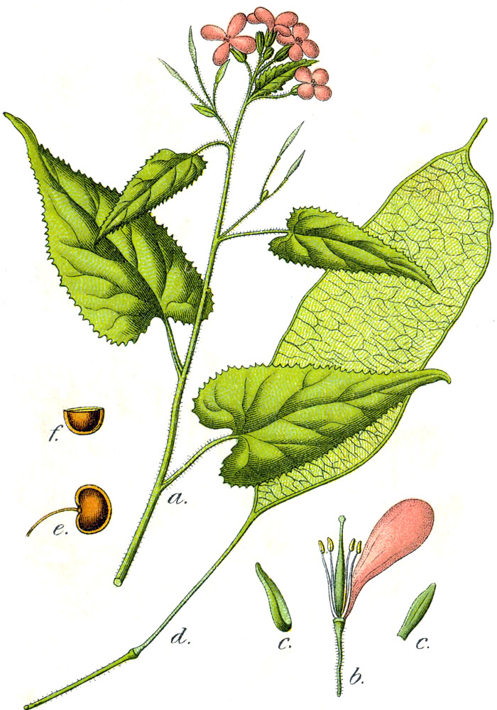 Lunaria rediviva L., syn. Crucifera rediviva E.H.L.Krause Original Caption Staudige Mondviole, Crucifera rediviva